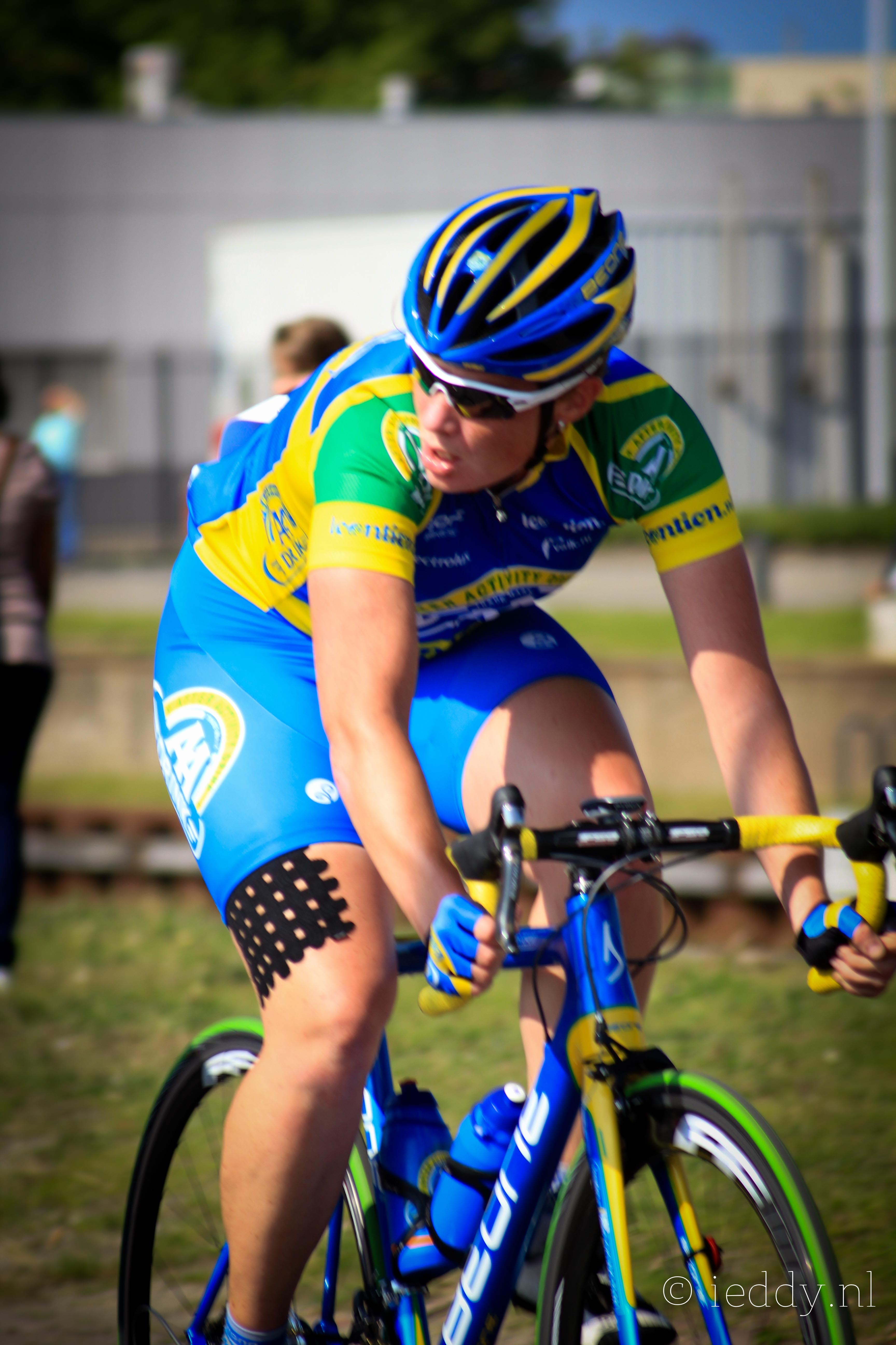 Kirsten Wild Draai van de Kaai 2011